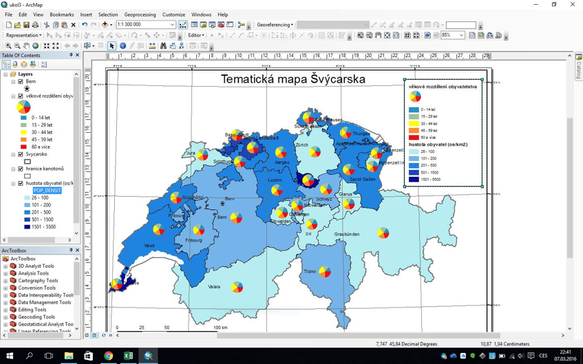 Ukázka prostředí ArcMapu 10.2.1